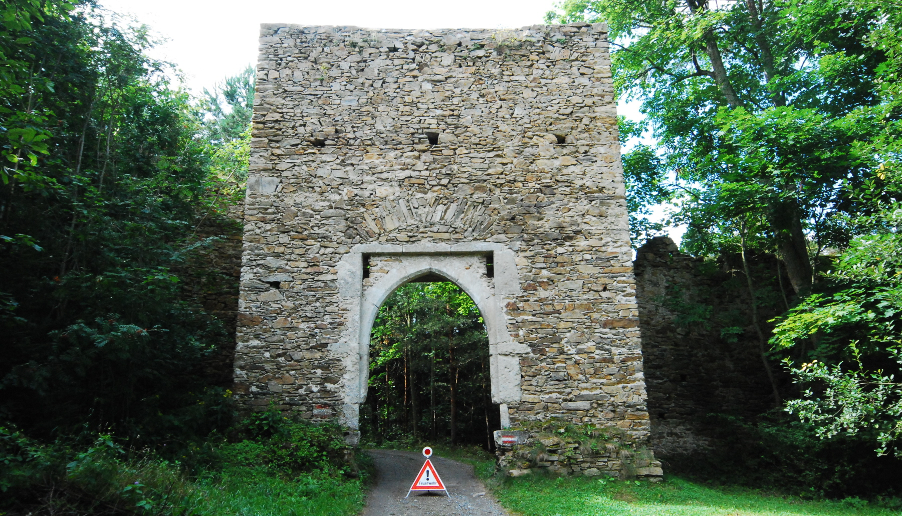 Das Tor in der Böhmischen Mauer bei Kollmitzdörfl in Niederösterreich